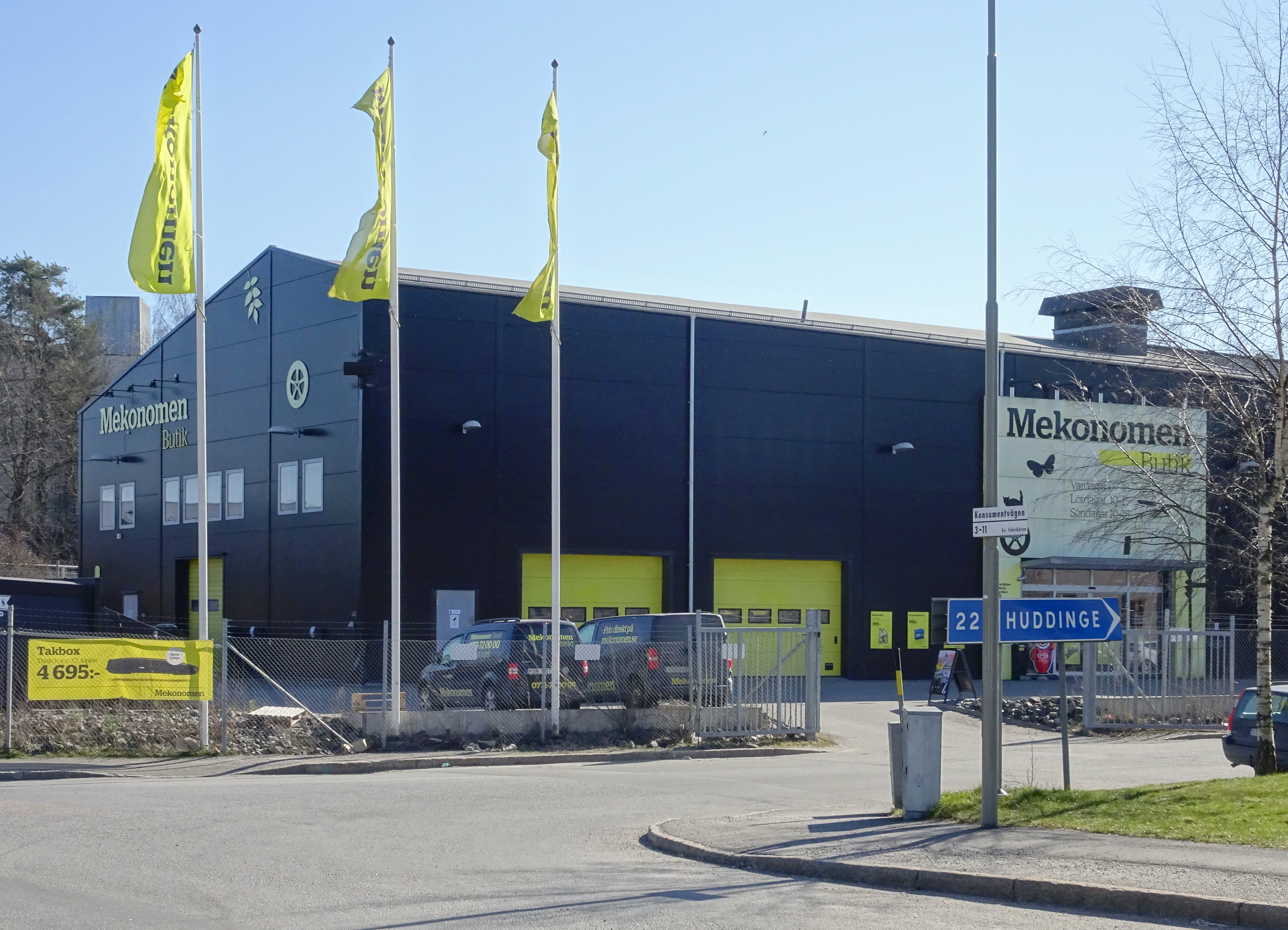 Älvsjö industriområde, Södra Stockholm, Grossistvägen 1-5